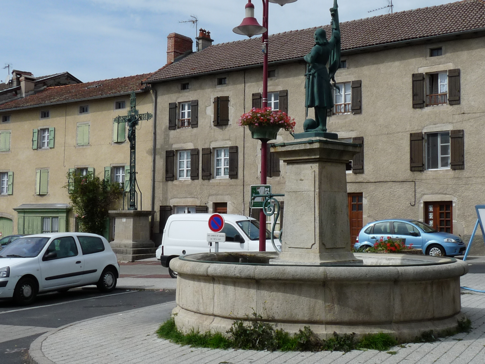 Rosières (Haute-Loire), Place Jeanne d'Arc